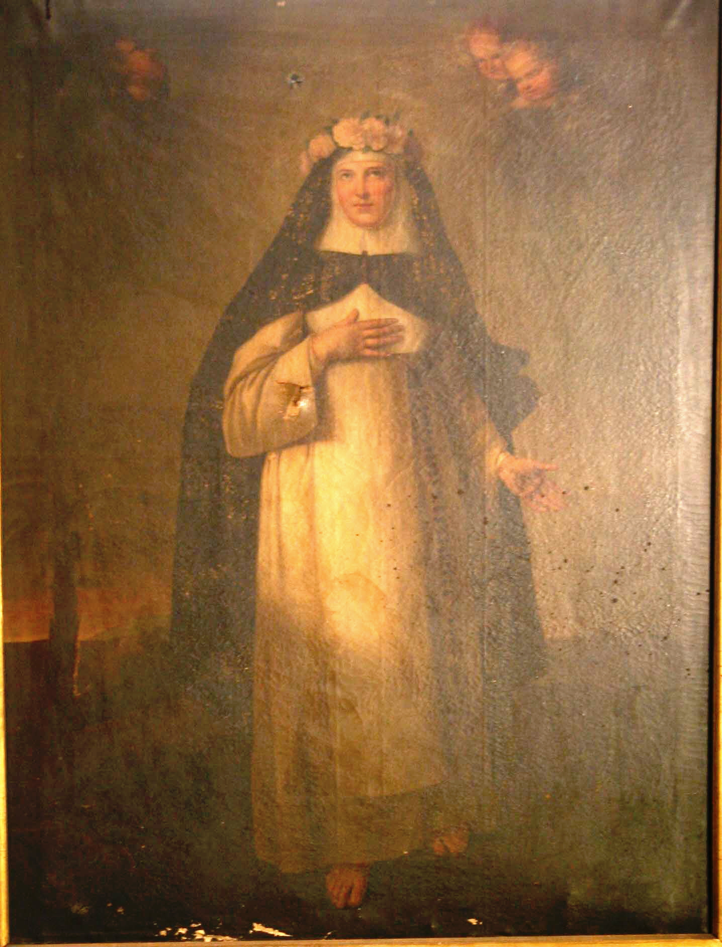 Sainte Rose de Lima, tableau d’Alexandre Bally, Église de La Trinité-La Palud à Marseille.